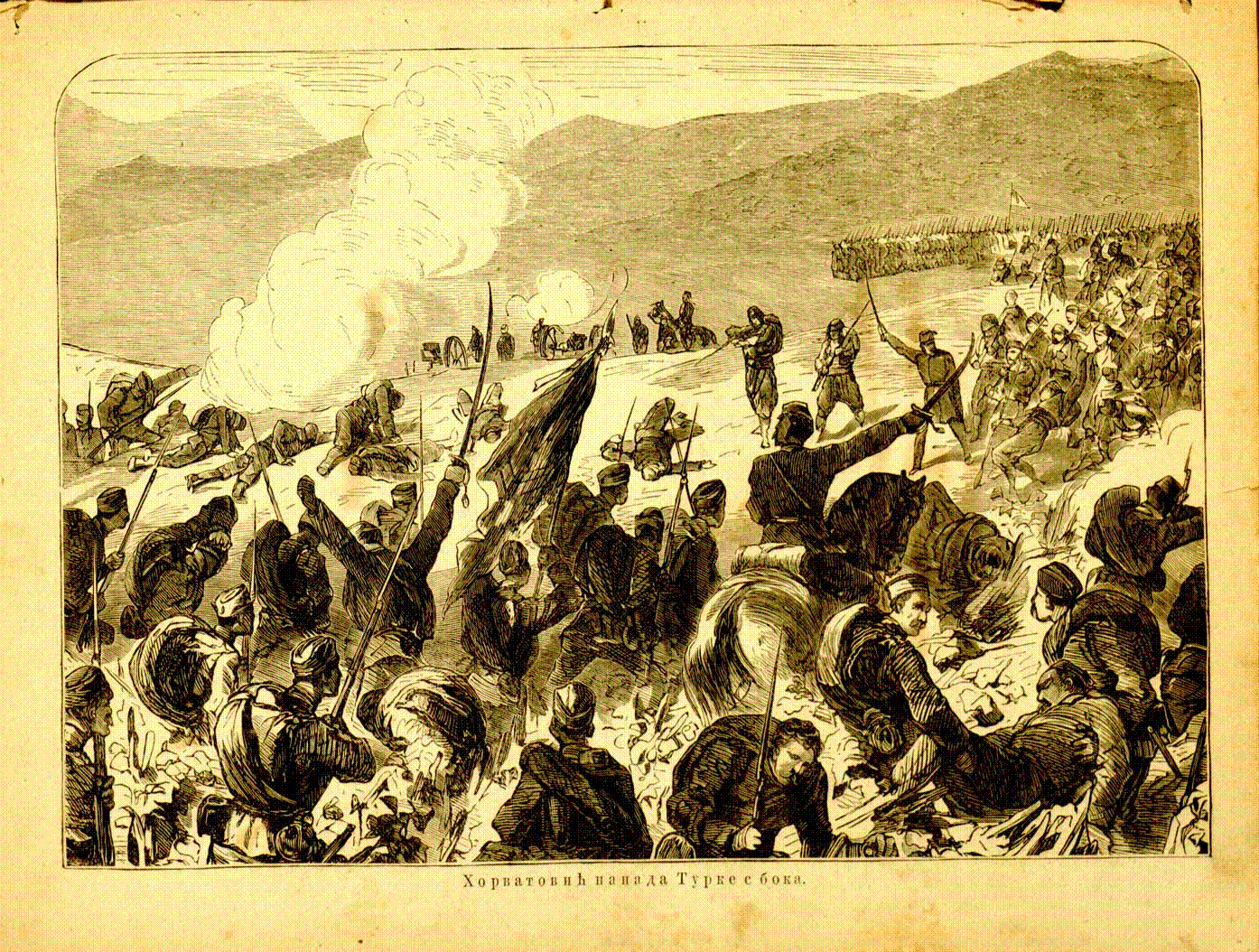 Horvatović greift die Türken von der Seite an.